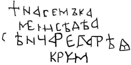 Кричимският надпис (или Асенов надпис) на Асеновия камък в Кричим